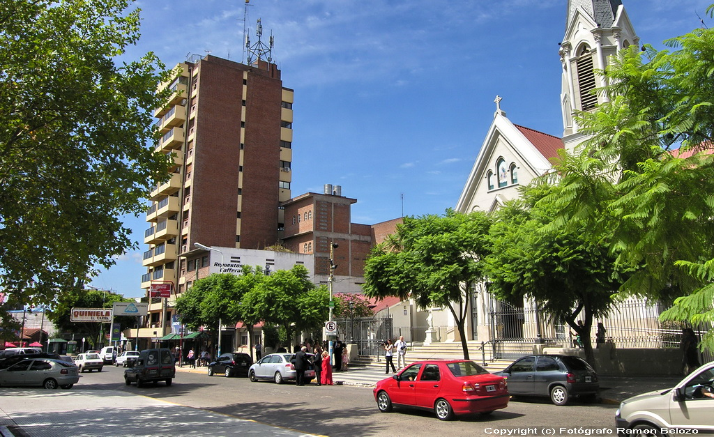 Iglesia Inmaculada Concepción.